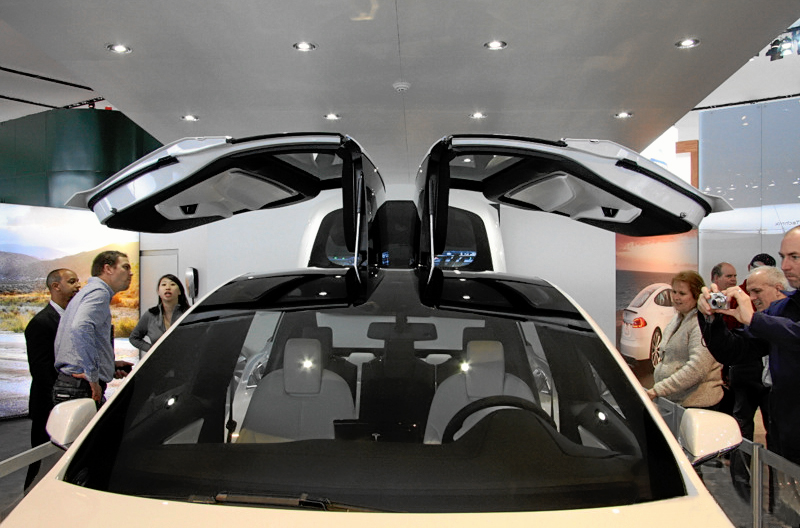 NAIAS 2013 Detroit: Tesla Model X / Foto: M. Rittgerott